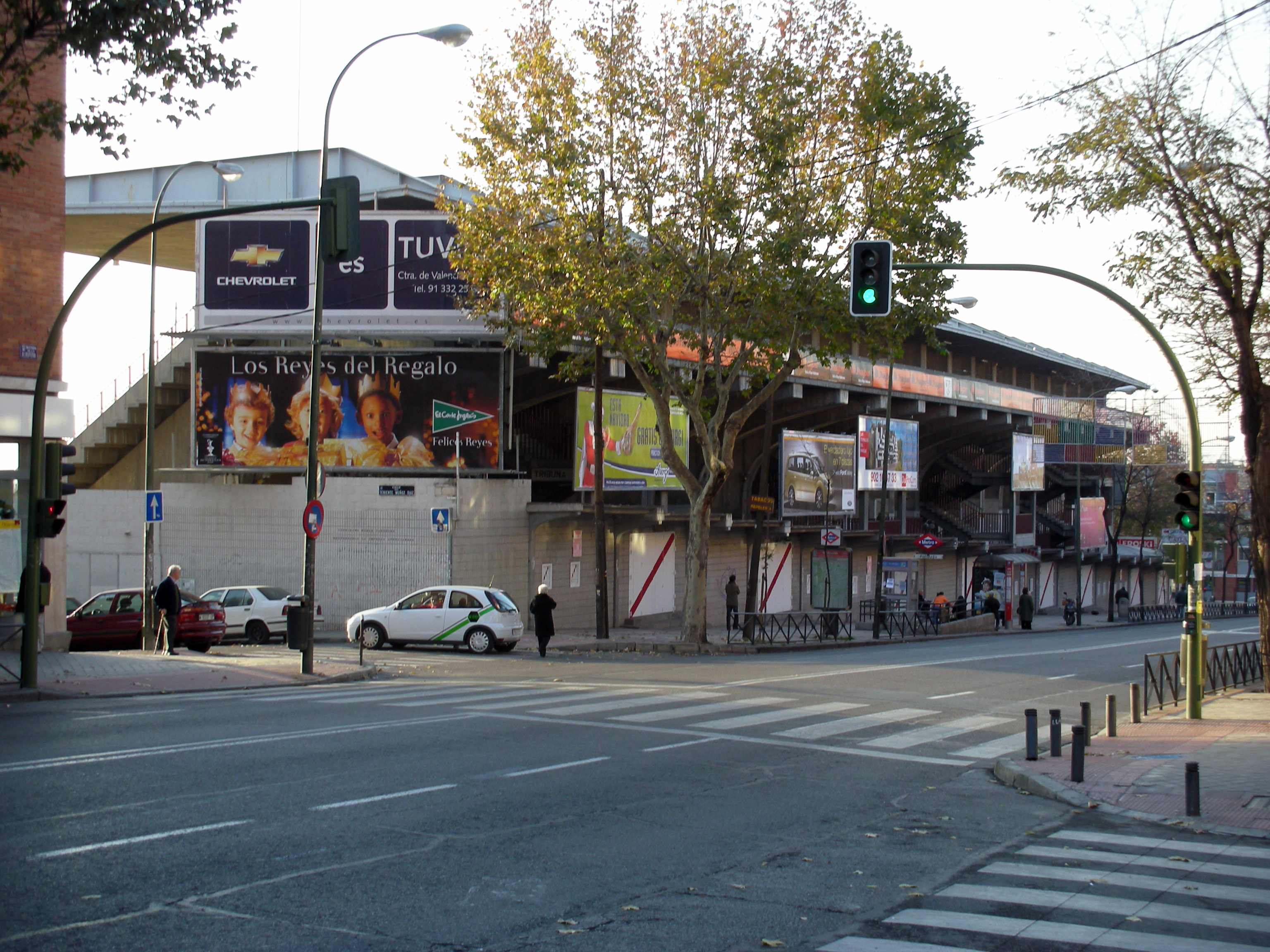 Teresa Rivero